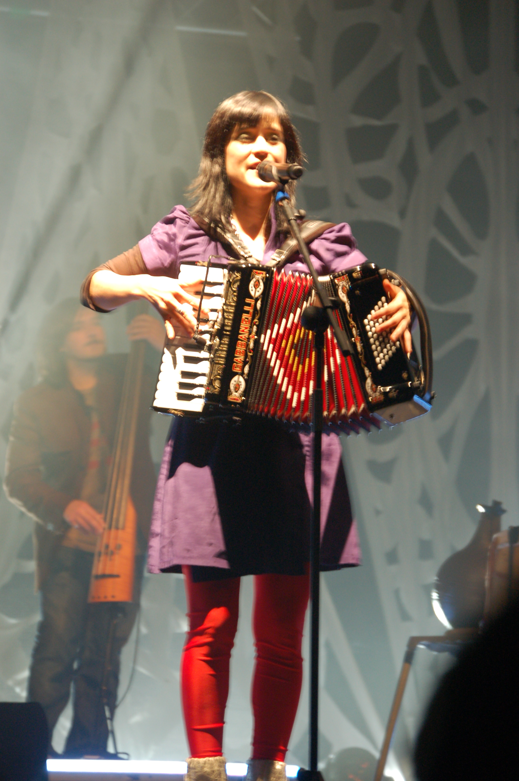 Julieta Venegas tocando o acordeón e cantando en Lugo Categoría:Imaxes de personalidades da música